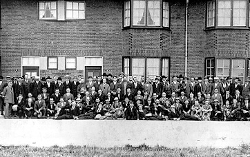 Stakend personeel van de Maastrichtsche Zinkwit Maatschappij in de zomer van 1929. Fotocollectie RHCL Maastricht, GAM 24.